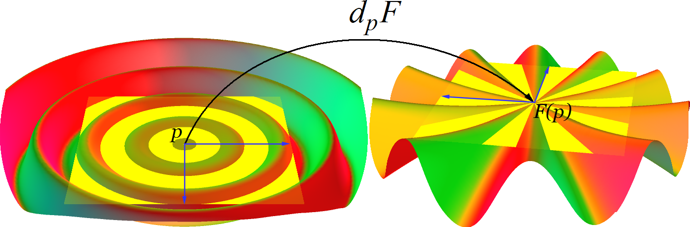 Aplicación diferencial.